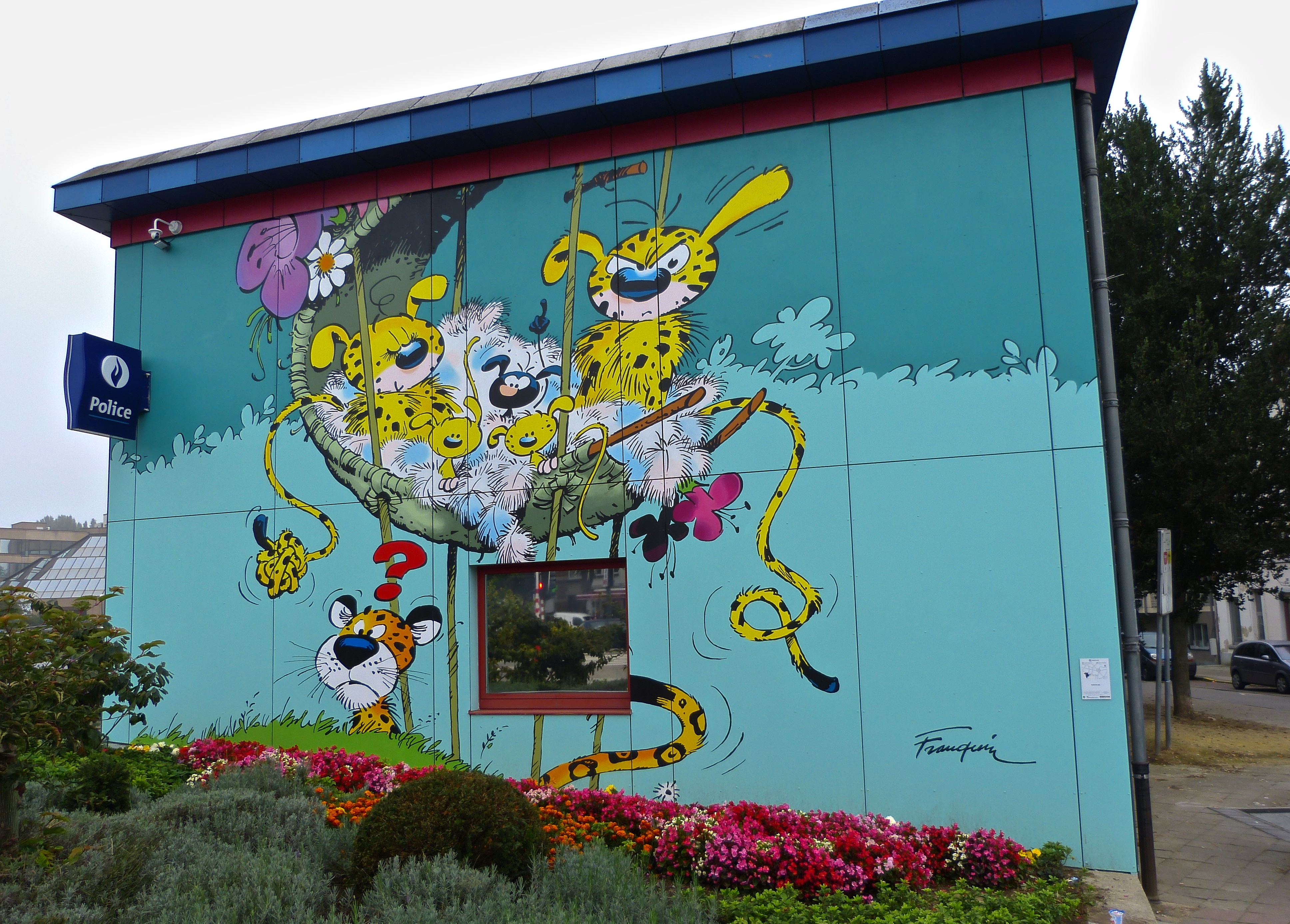 Marsupilami. Wandgemälde in Laeken (Brüssel), Avenue Houba de Strooper 141 (Parcours bande dessinée)[1]